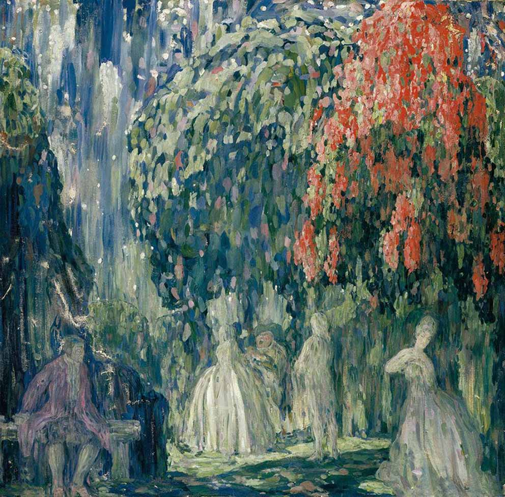 "Вечерний праздник"